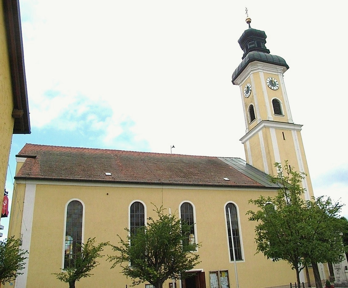 Die Pfarrkirche St. Martin in Eichendorf